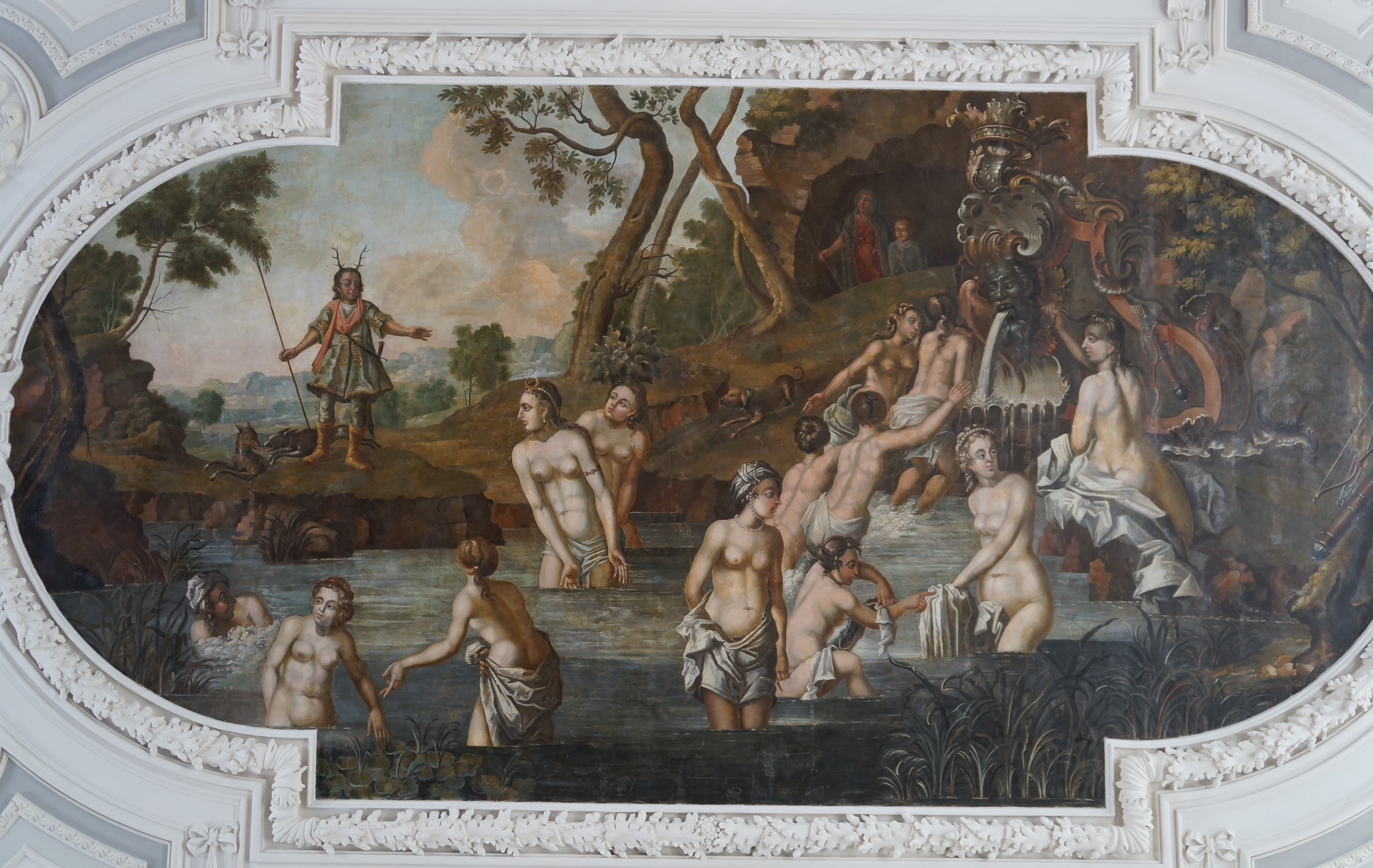 Kadriorg_Palace à Tallinn, Estonie.